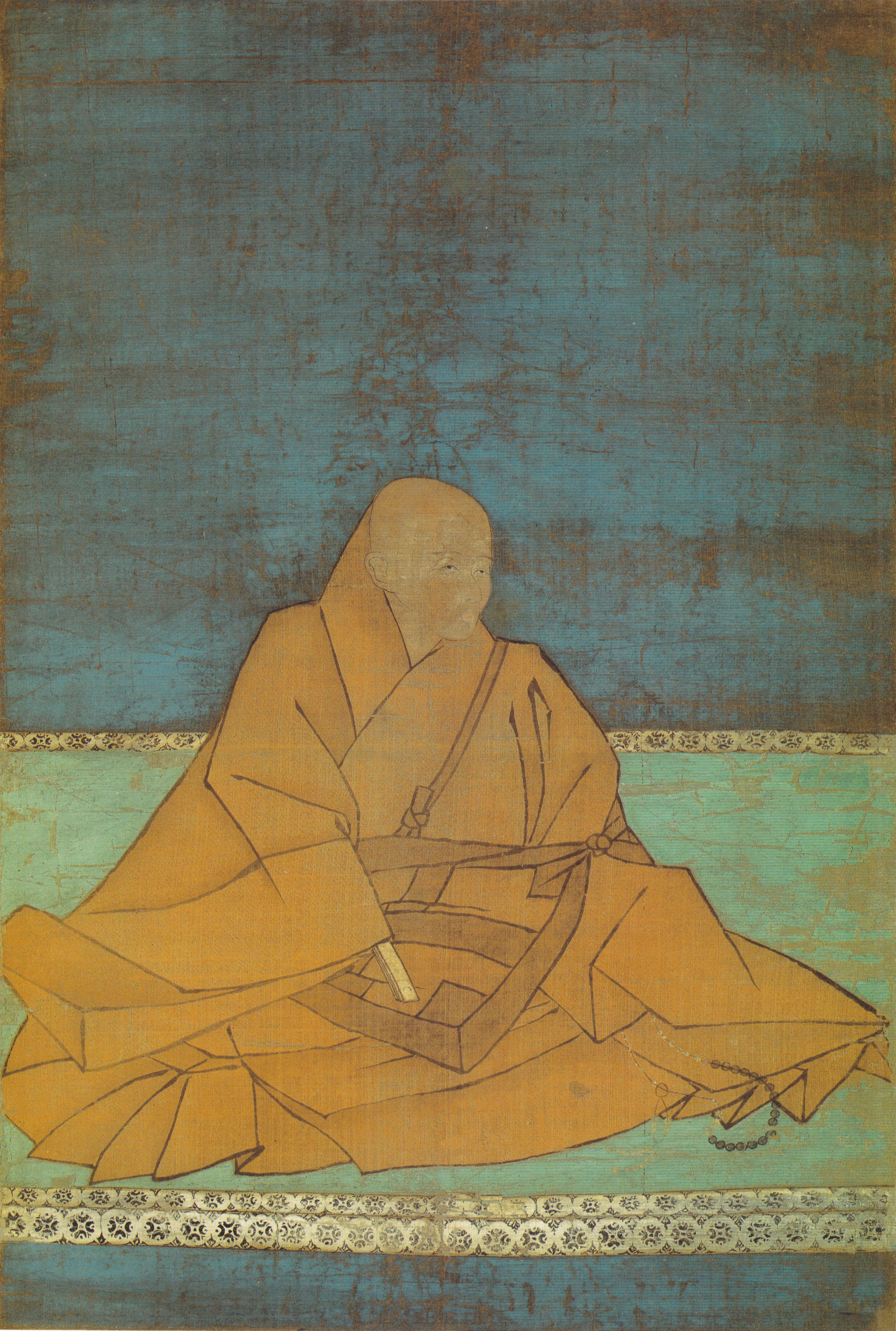 大僧正顕弁（1269-1331）、北条顕時子、園城寺長吏、鶴岡若宮別当